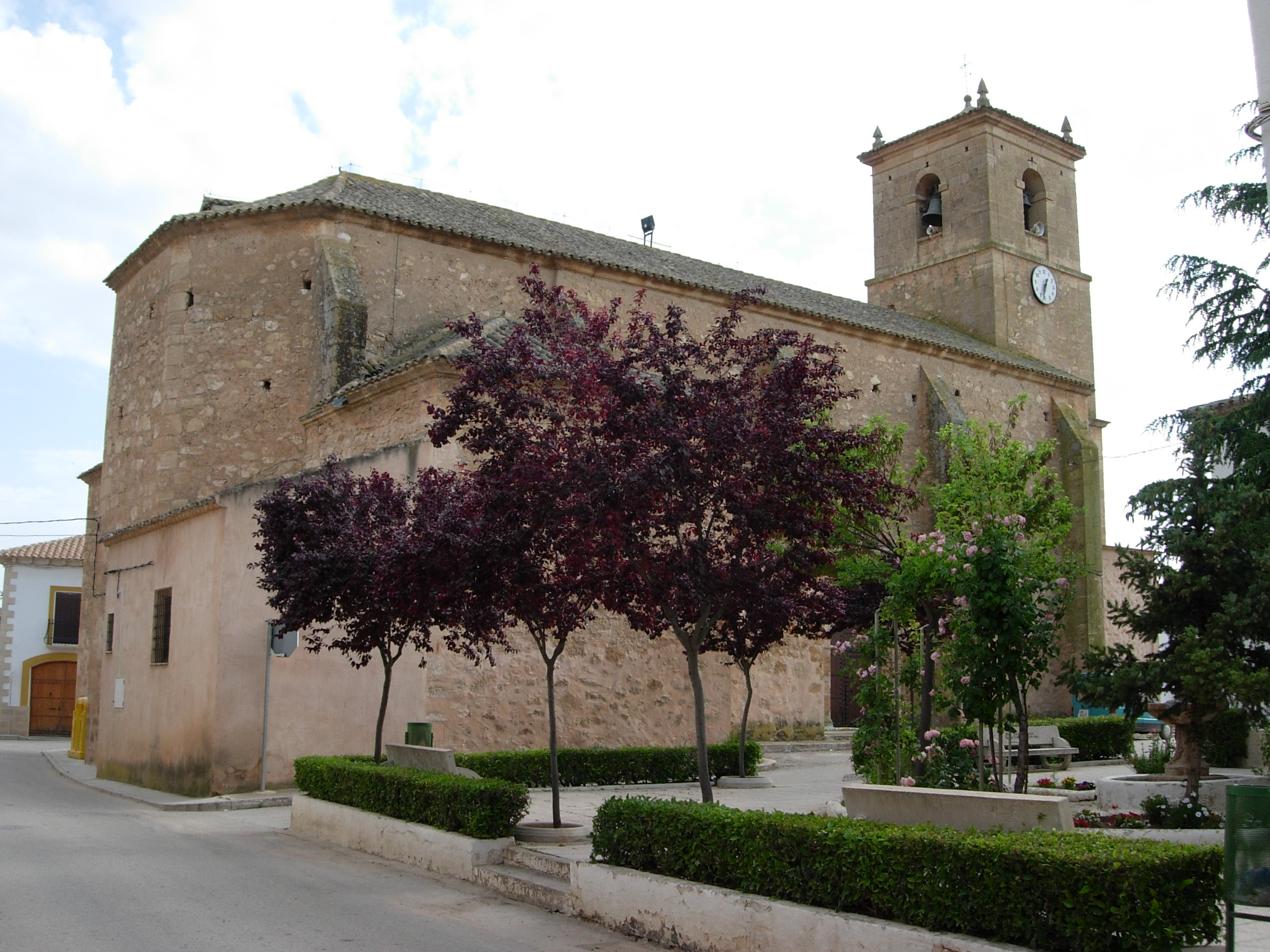 Vista de la iglesia de El Picazo (Cuenca, España) en la plaza del Ayuntamiento.